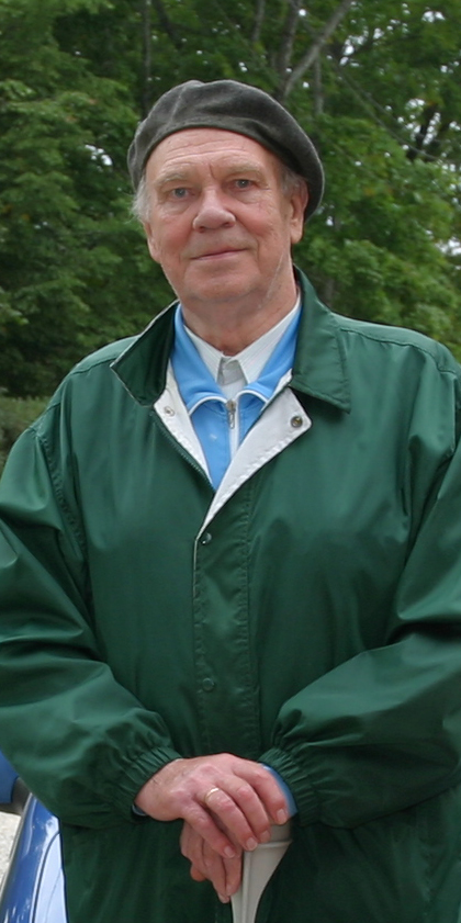 Heino Mägi septembris 2005